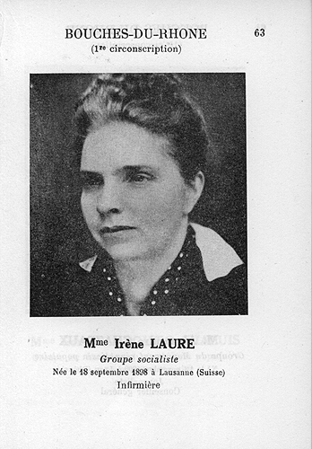 Irène Laure sur sa photo officielle de député à l'Assemblée nationale début novembre 1945